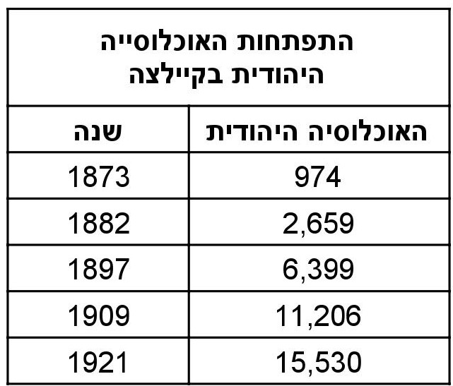 התפתחות האוכלוסייה היהודית בקיילצה